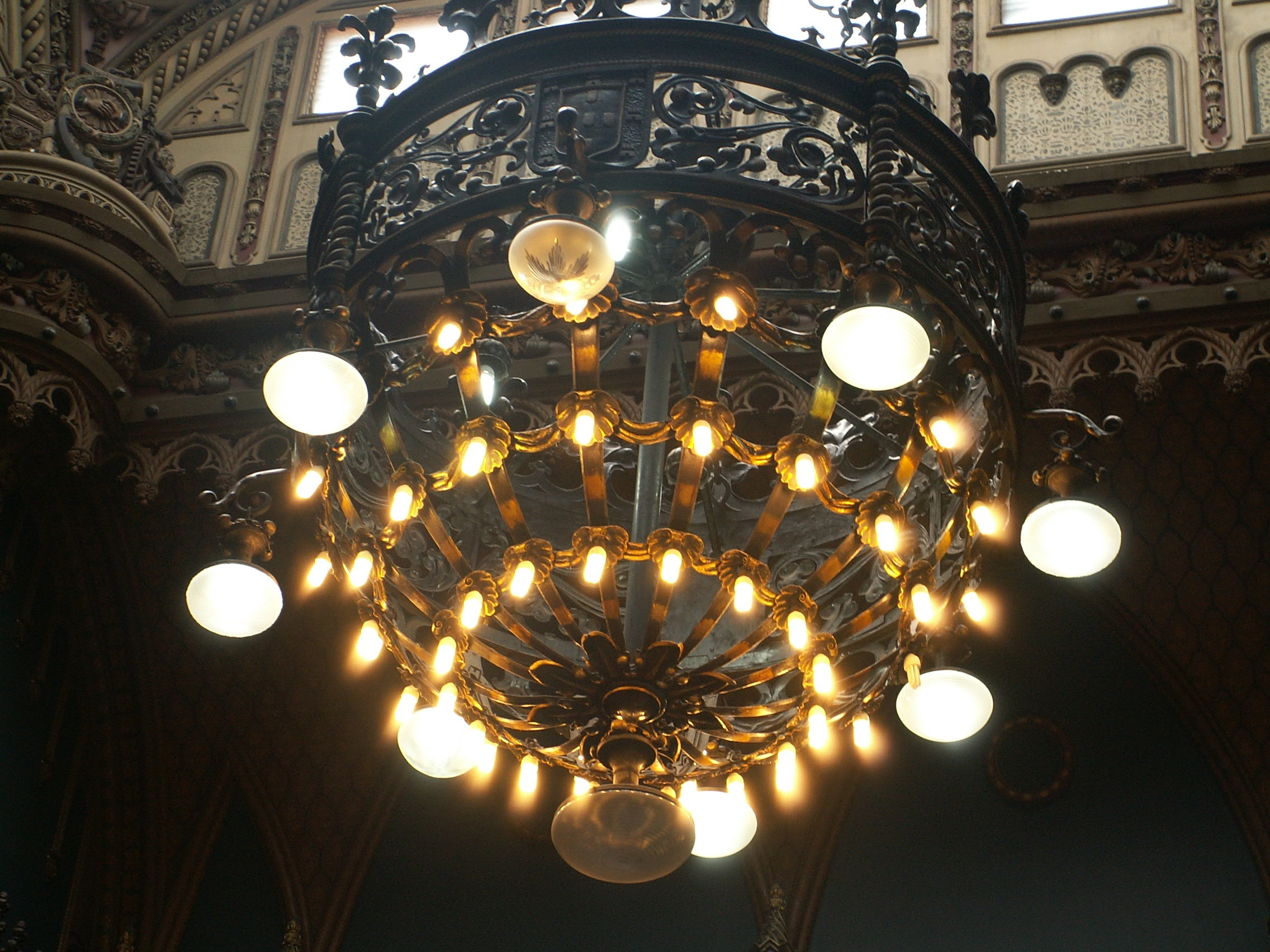 Chandelier of the Real Gabinete Português de Leitura in Rio de Janeiro, Brazil